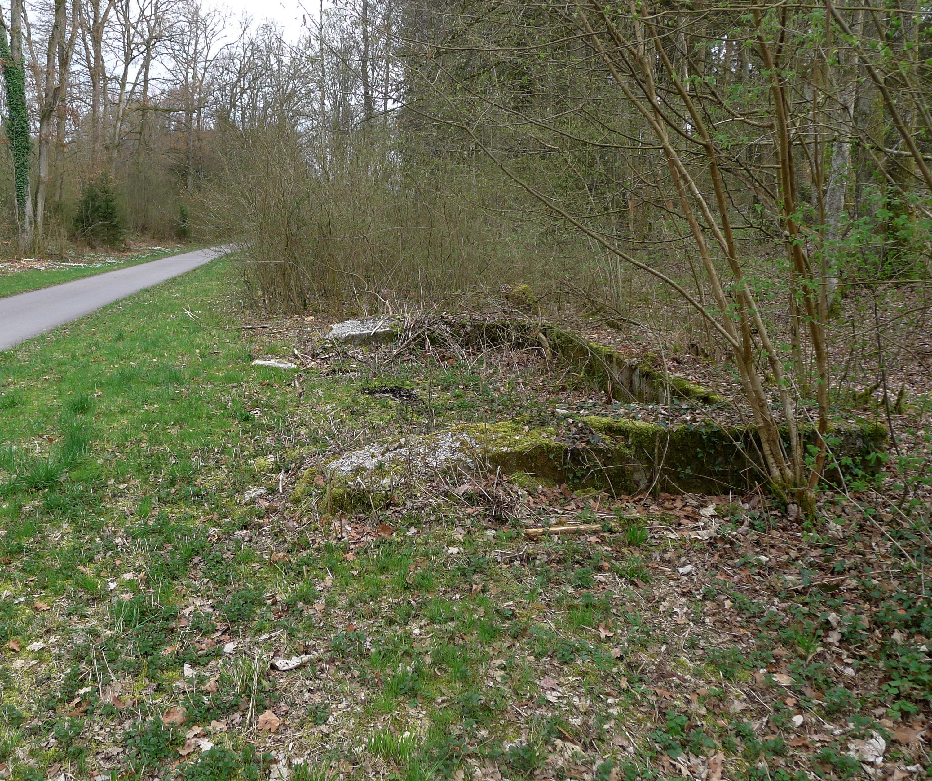 De restanten van het wachthuisje van de voormalige Siebenmühlentalbahn bij de Schlösslesmühle